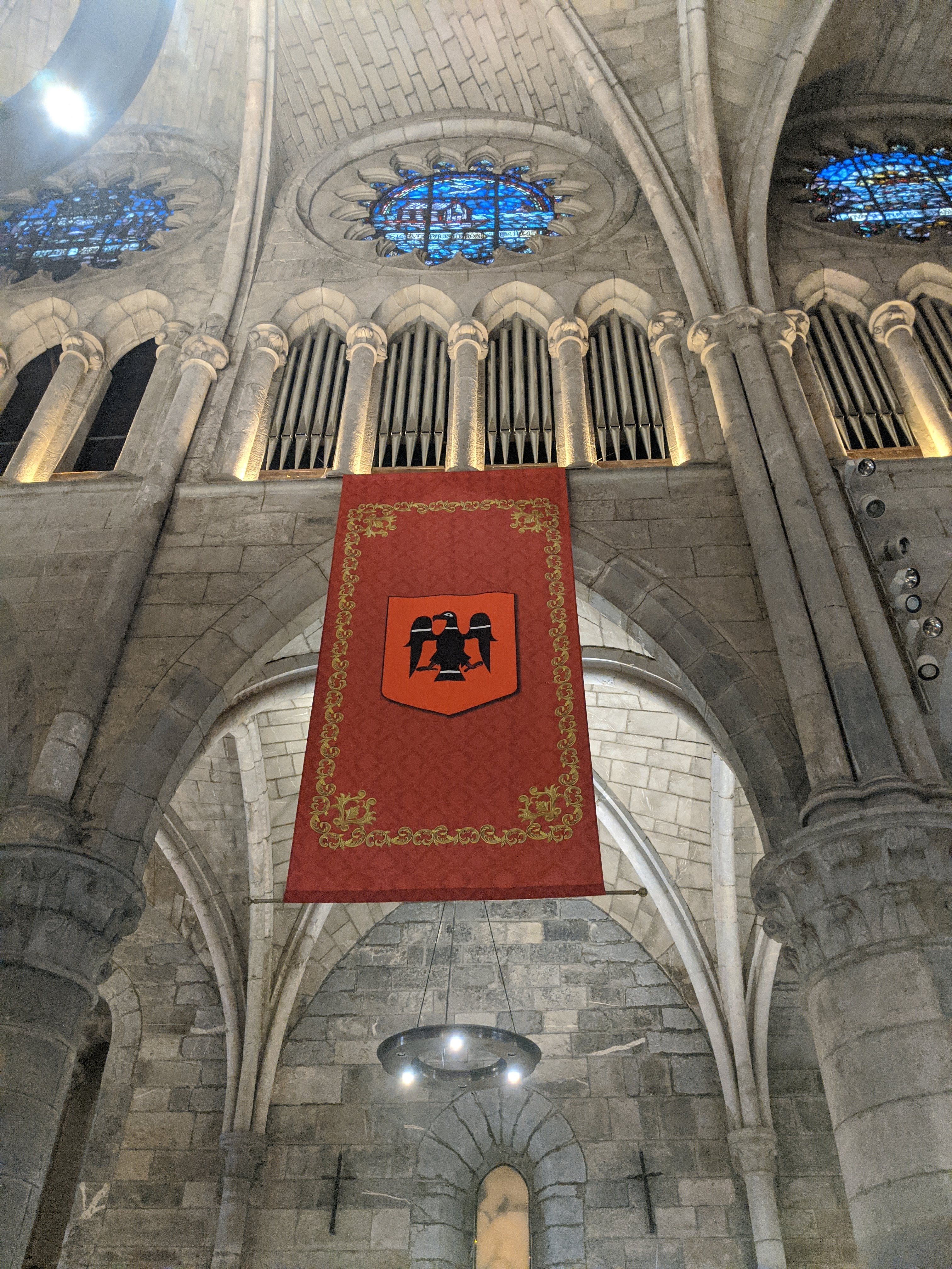 Arrano beltzaren ikurrak XII. mendeaz geroztik Nafarroako erregeek beren zigiluetan erabilitako arrano irudia du oinarri; zehazki esanda, Antso VII.a Azkarrak XIII. mendearen hasieran erabilitako zigiluan ageri den arrano irudia.